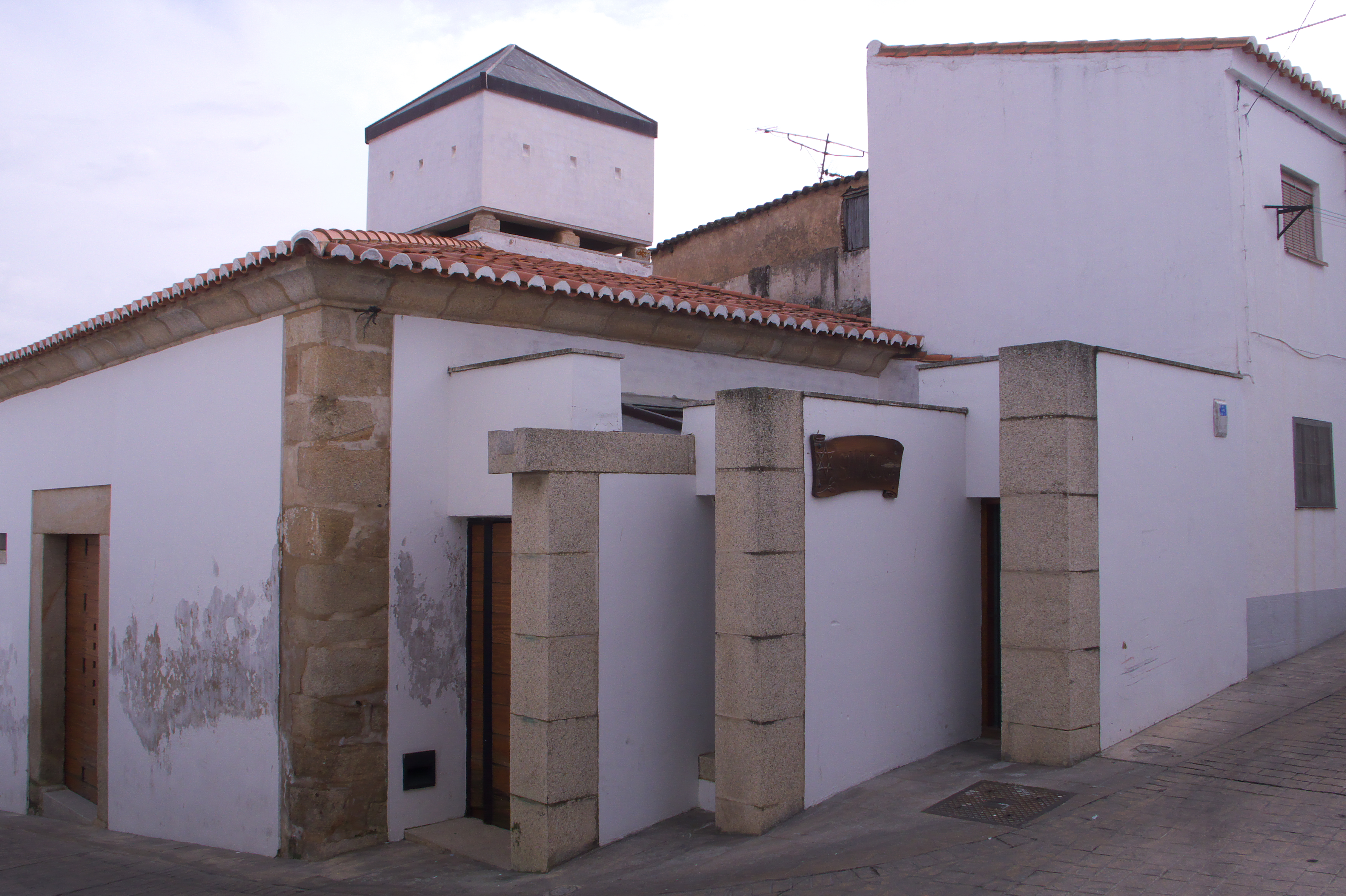 Así llamada por los mayores valentinos. Su volumen, elementos arquitectónicos y marco urbano, nos ofrece una interesante sinagoga.